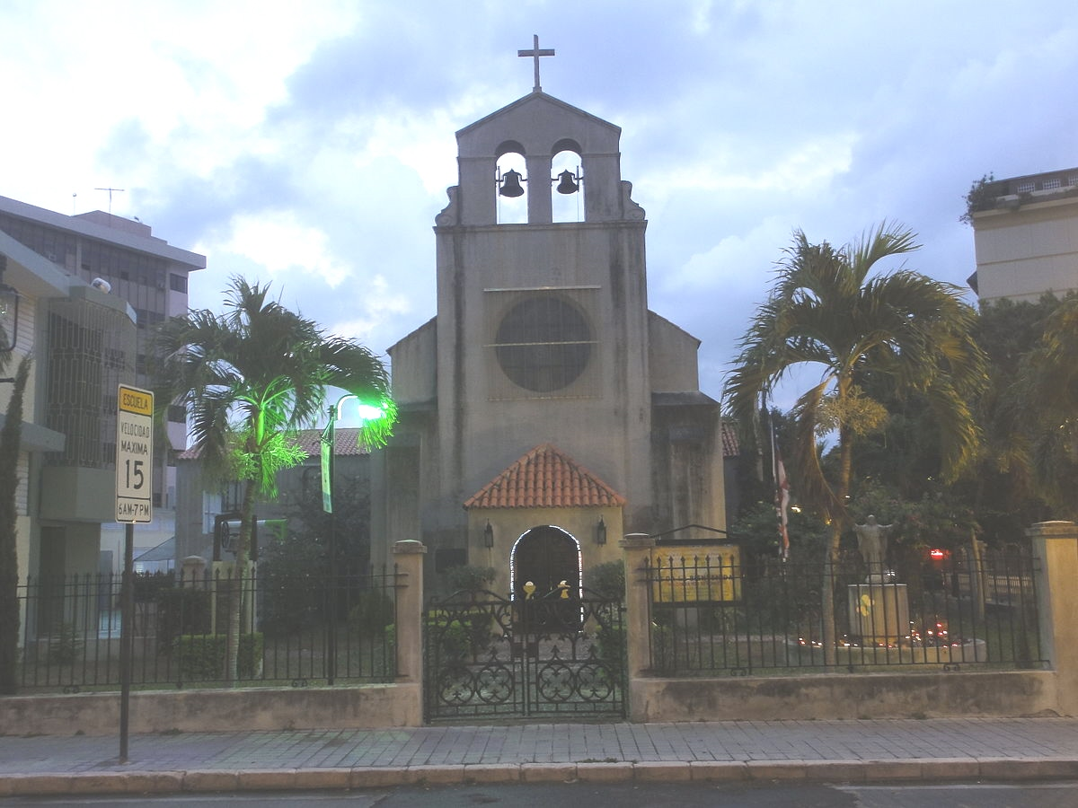 Iglesia de la Santisima Trinidad, Barrio Cuarto, Ponce, PR